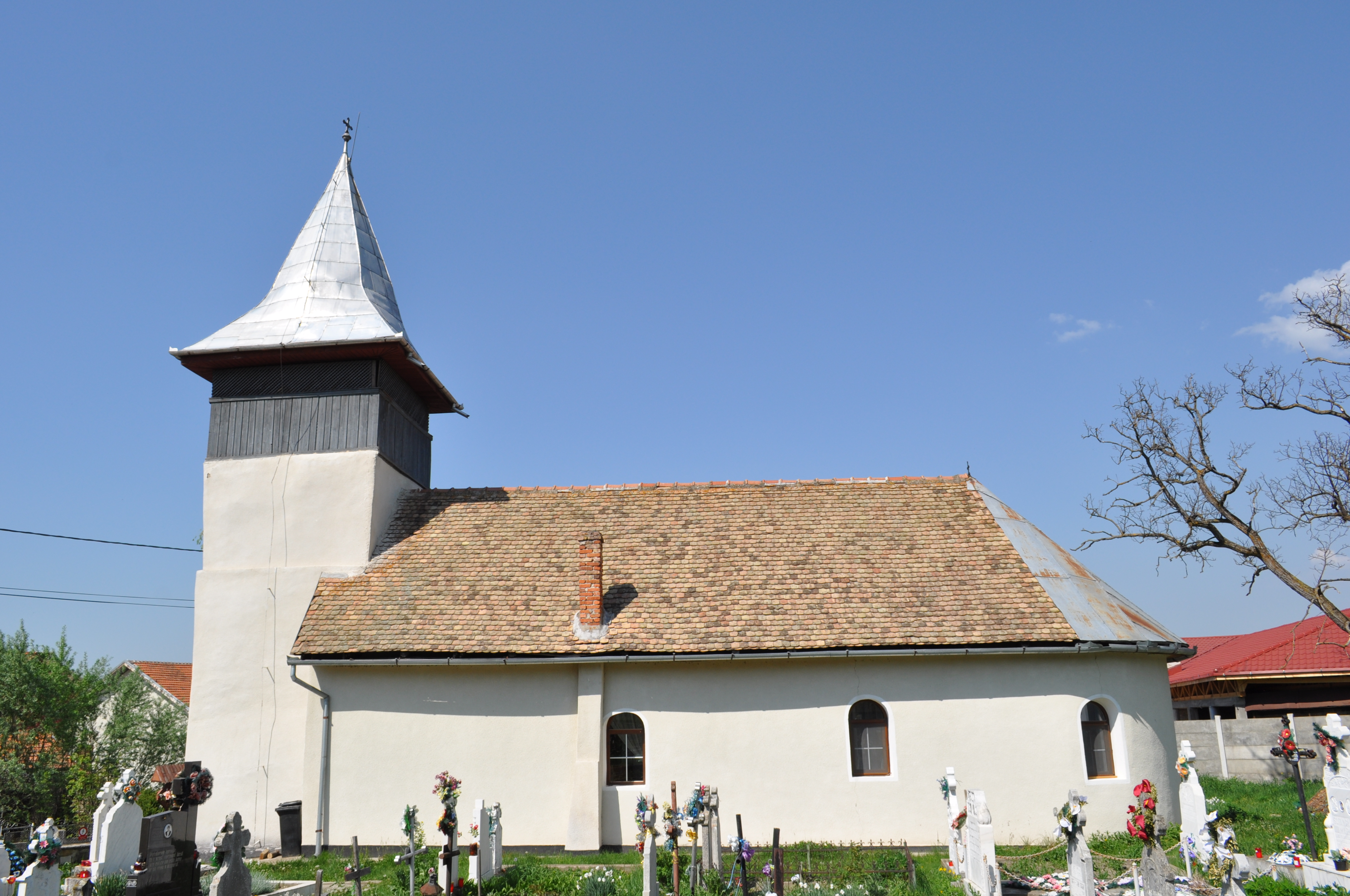 Biserica "Sf. Apostoli Petru și Pavel", sat SĂLAŞU DE SUS; comuna SĂLAŞU DE SUS